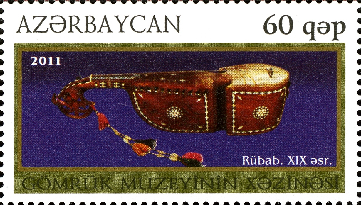 Gömrük Muzeyinin xəzinəsi